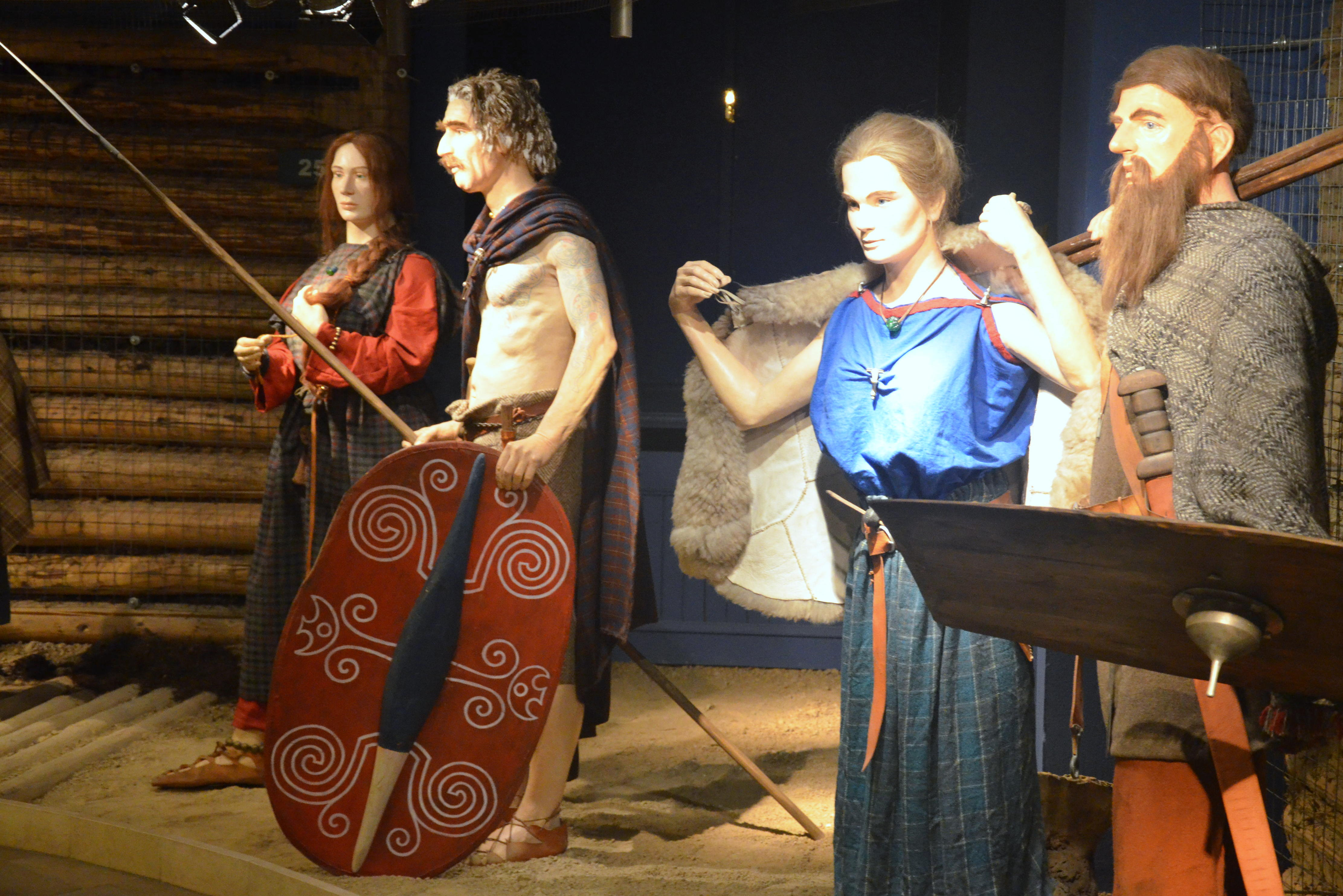 Tracht- und Schmuckelemente in der Przeworsk-Kultur (Südpolen) im 3.Jh. v. Chr. bis 2. Jh. n. Chr.